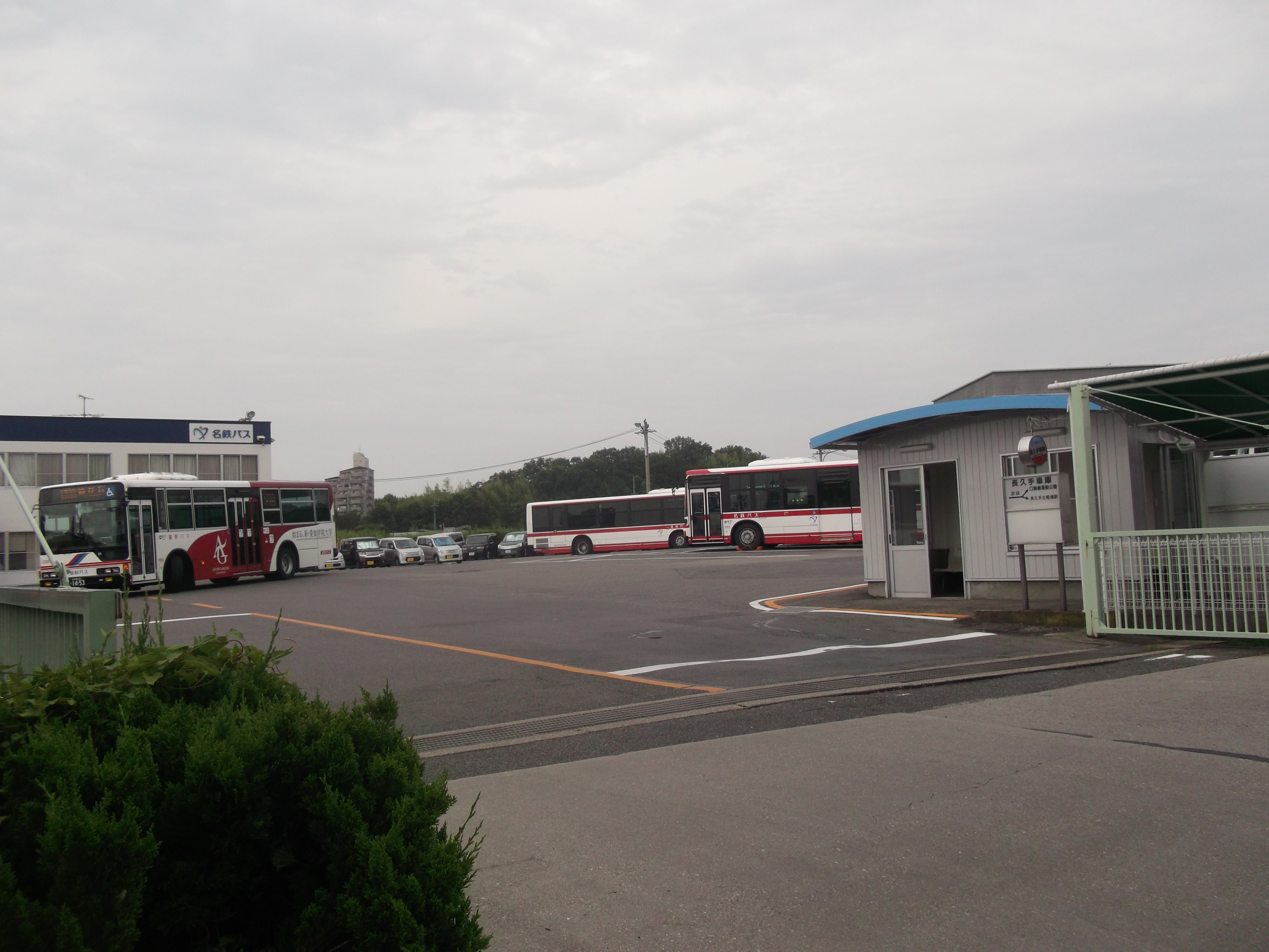 愛知県長久手市横道の名鉄バス長久手車庫を南側公道西側より撮影